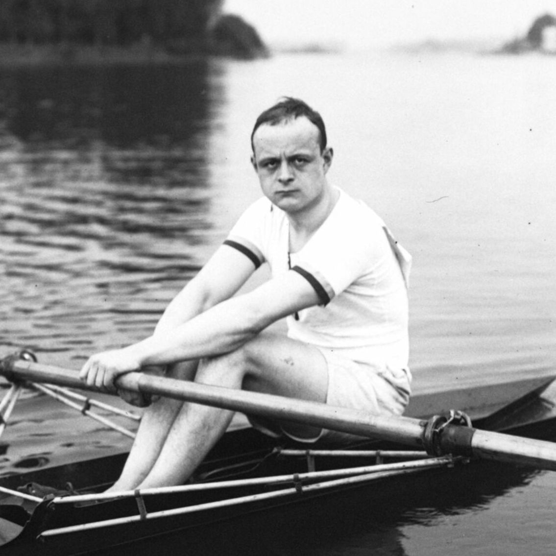 Barrelet [portrait du rameur, aviron à Juvisy, 30-5-13] : [photographie de presse] / [Agence Rol]